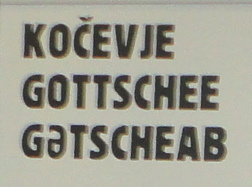 Ime mesta Kočevje v slovenščini, nemščini in kočevarščini